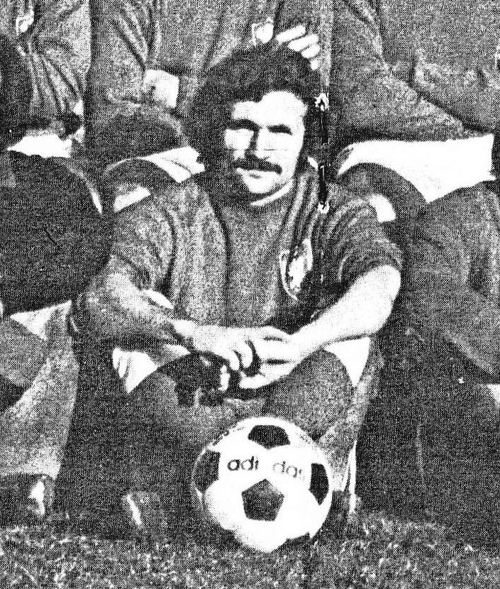 Il calciatore italiano Renato Curi al Perugia nella stagione 1974-75.